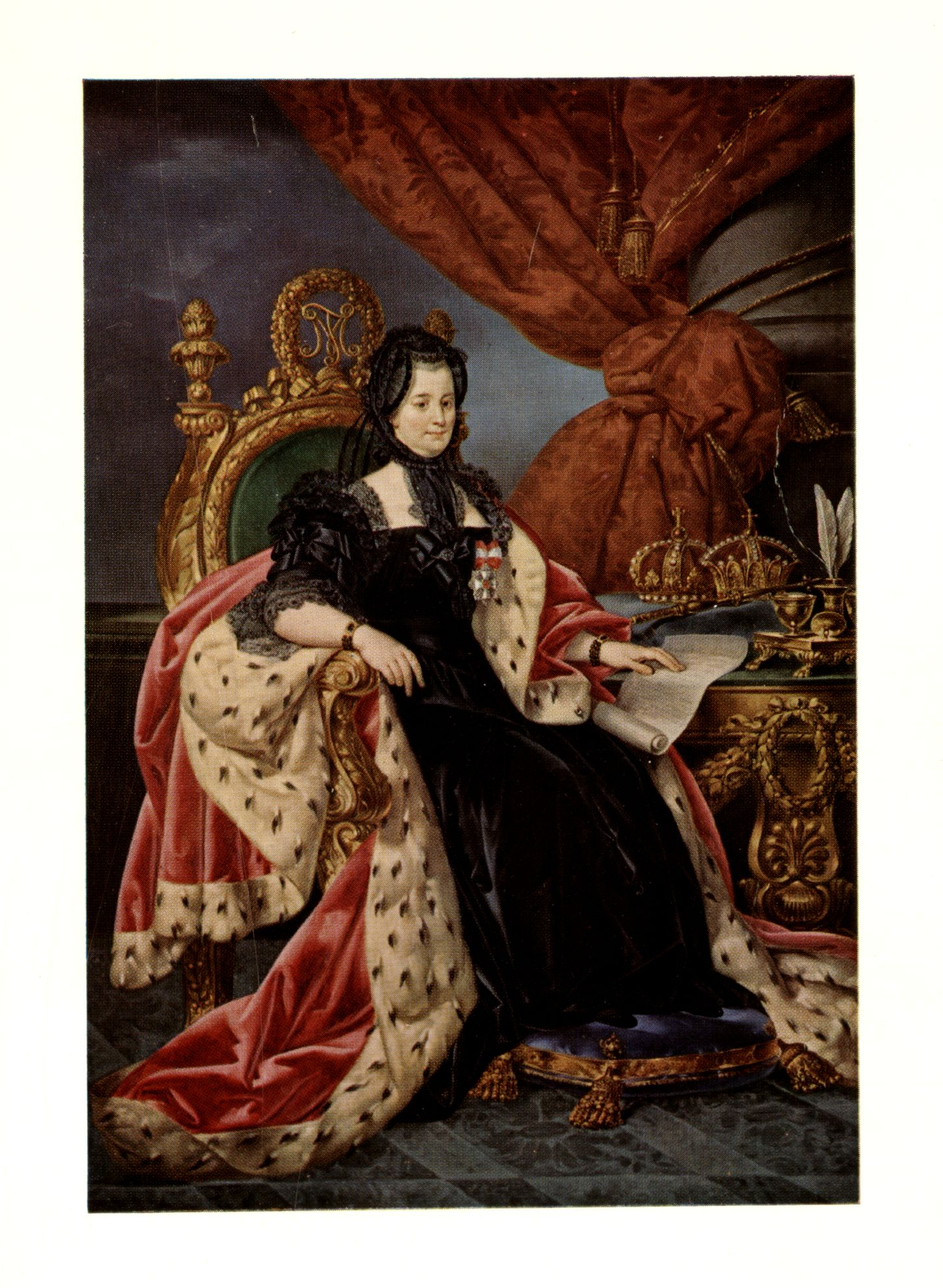 Imperatrice Maria Teresa d'Asburgo